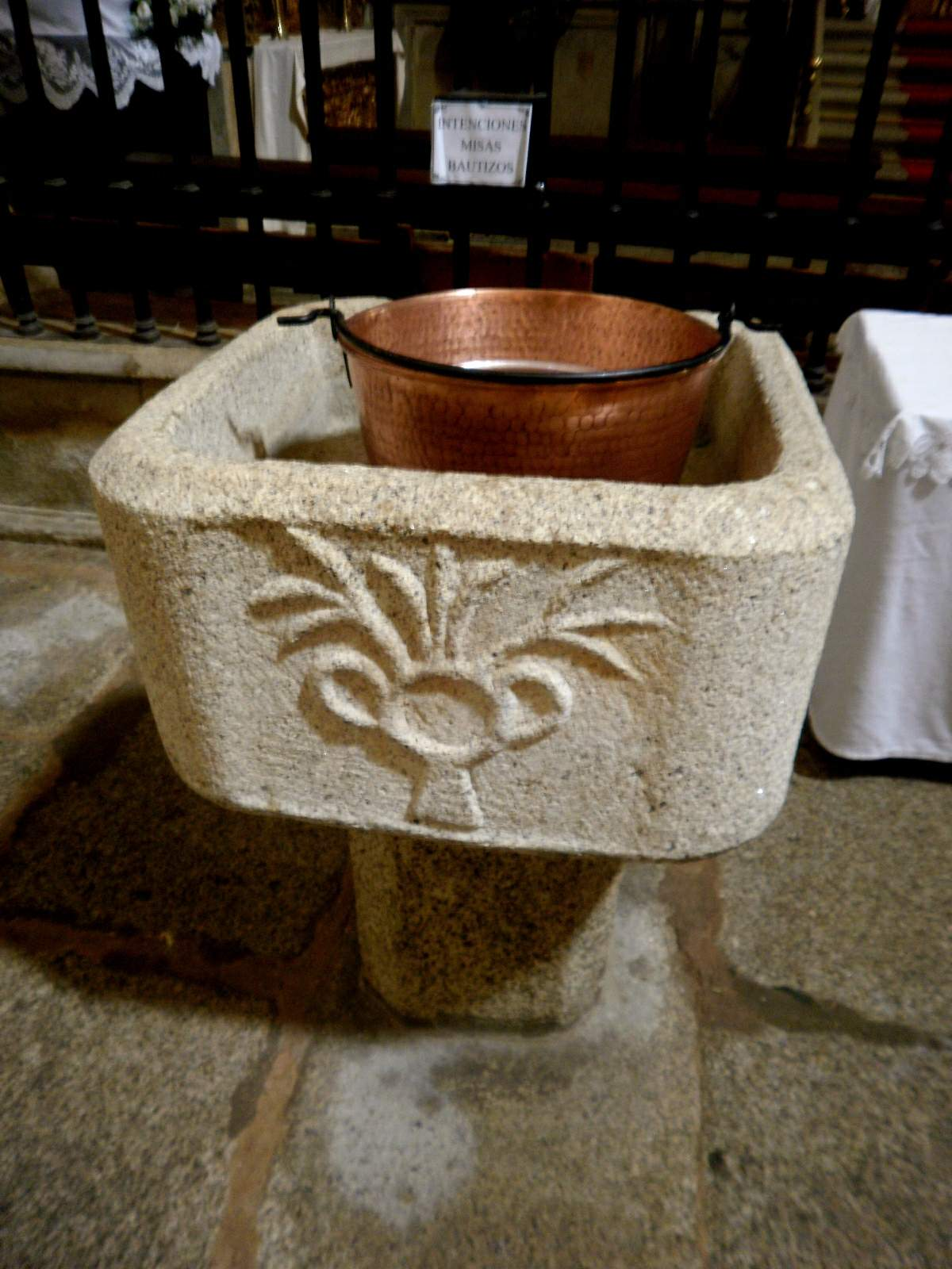 Iglesia de Santiago, Cáceres